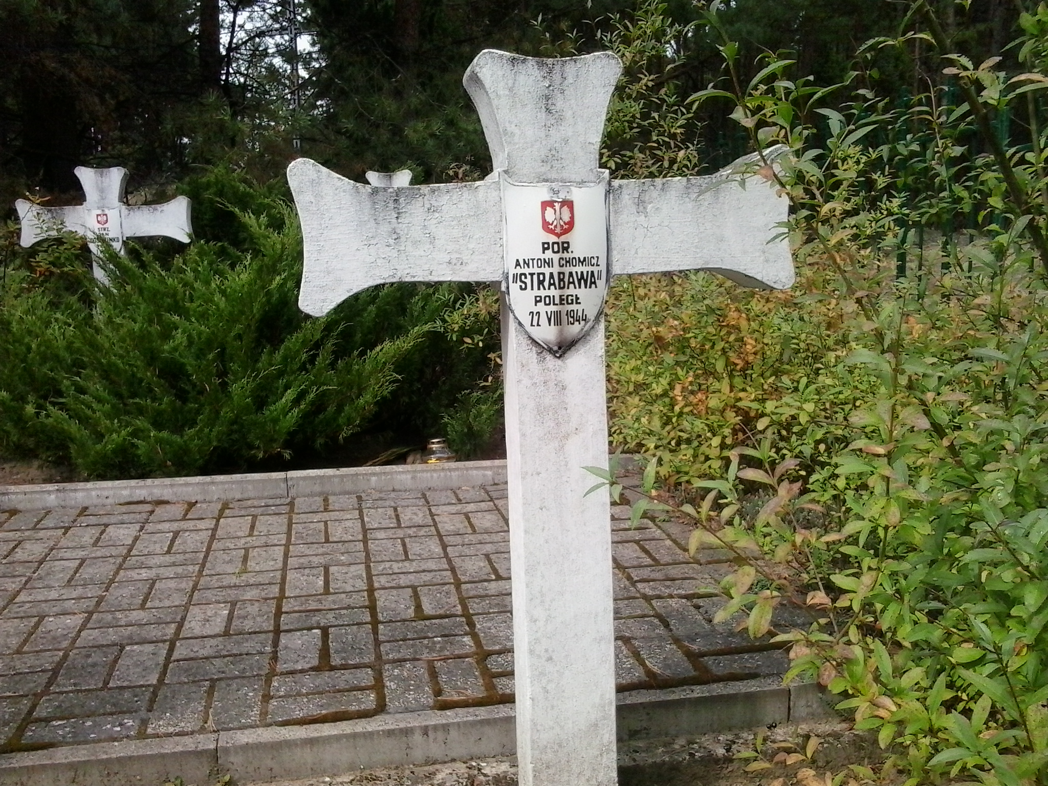 Grób por. Antoniego Chomicza "Stabrawa"